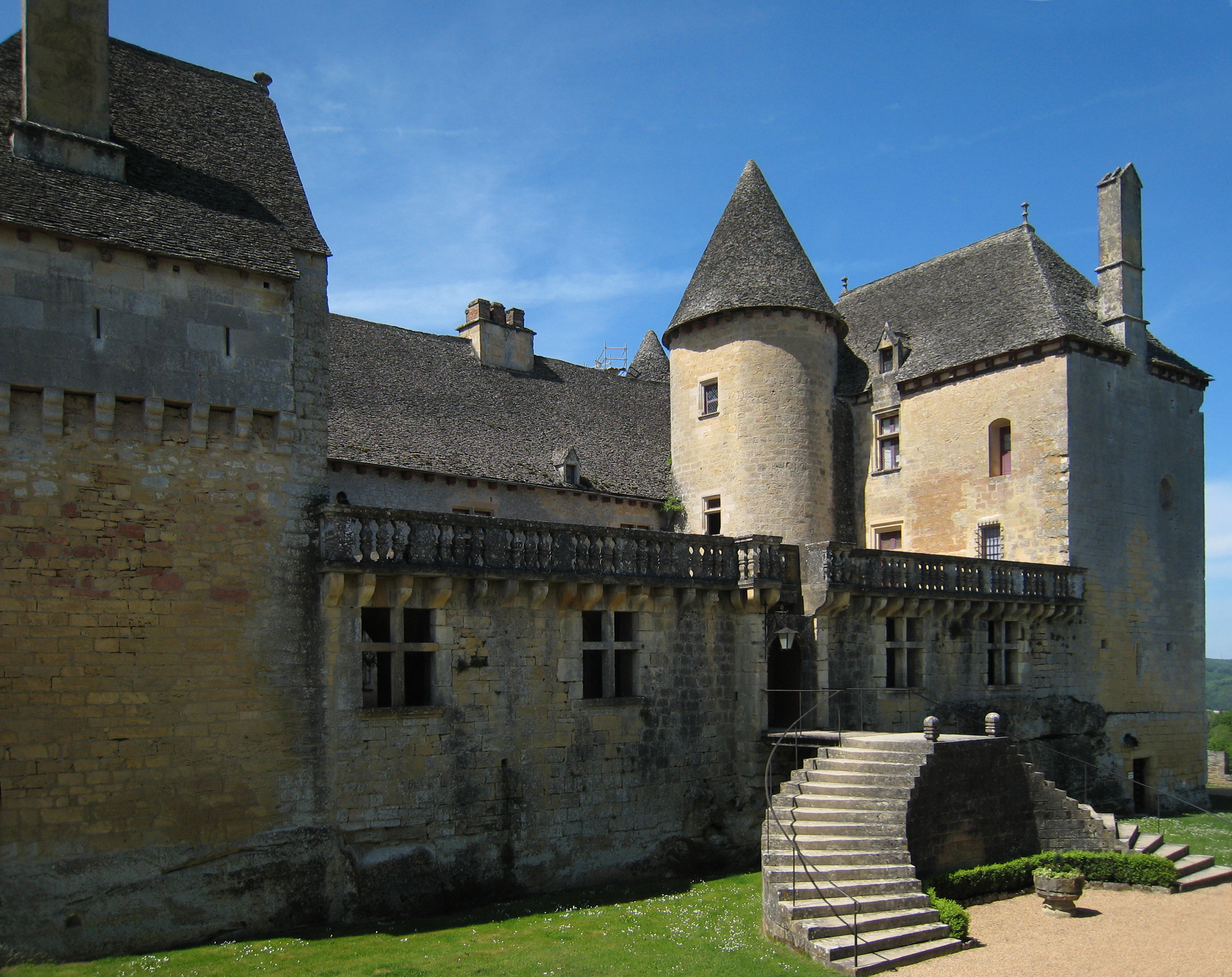 Château de Fénelon near the village of Sainte-Mondane, Département Dordogne/France.